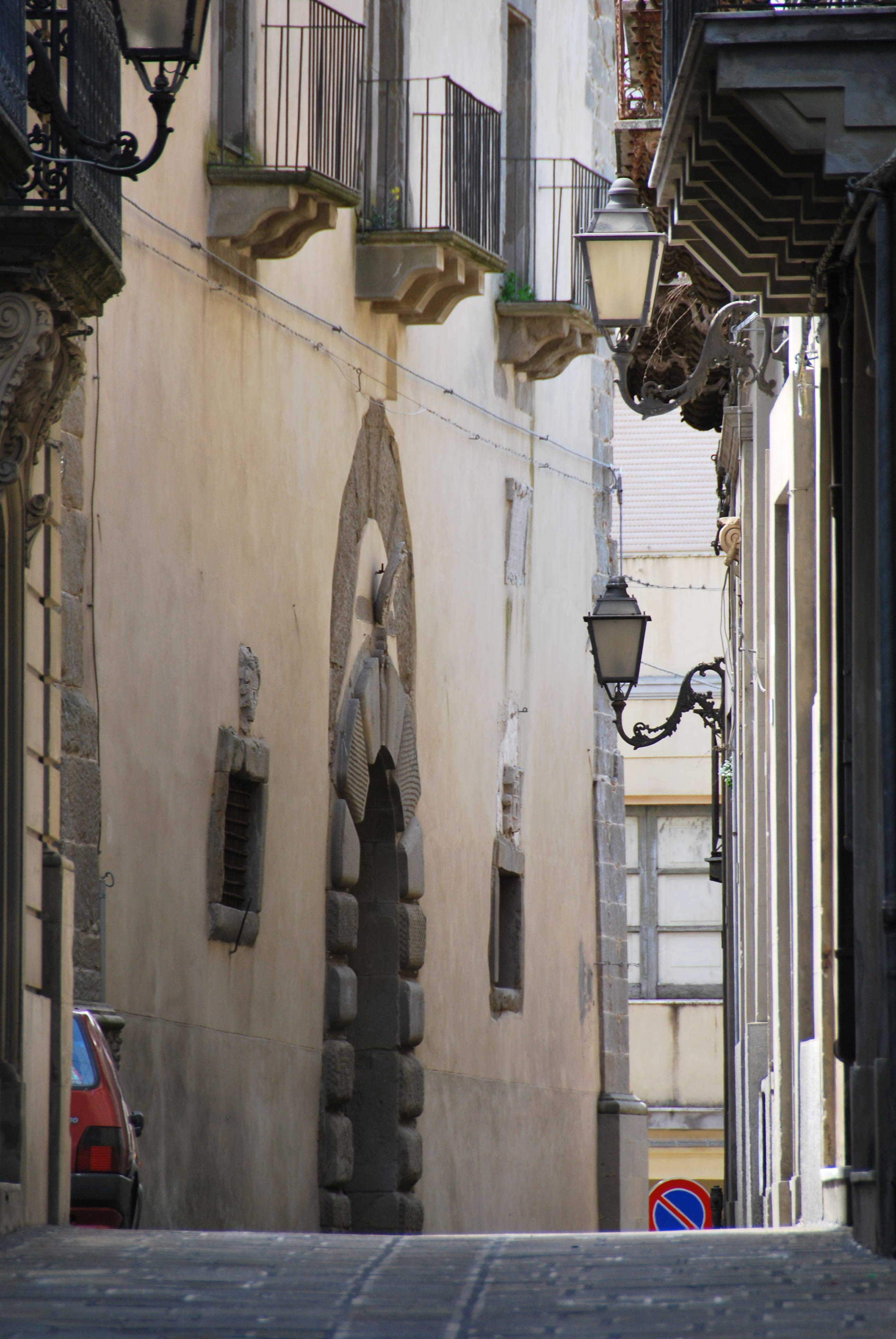 Torre Capitanaria in Via Conte Ruggero